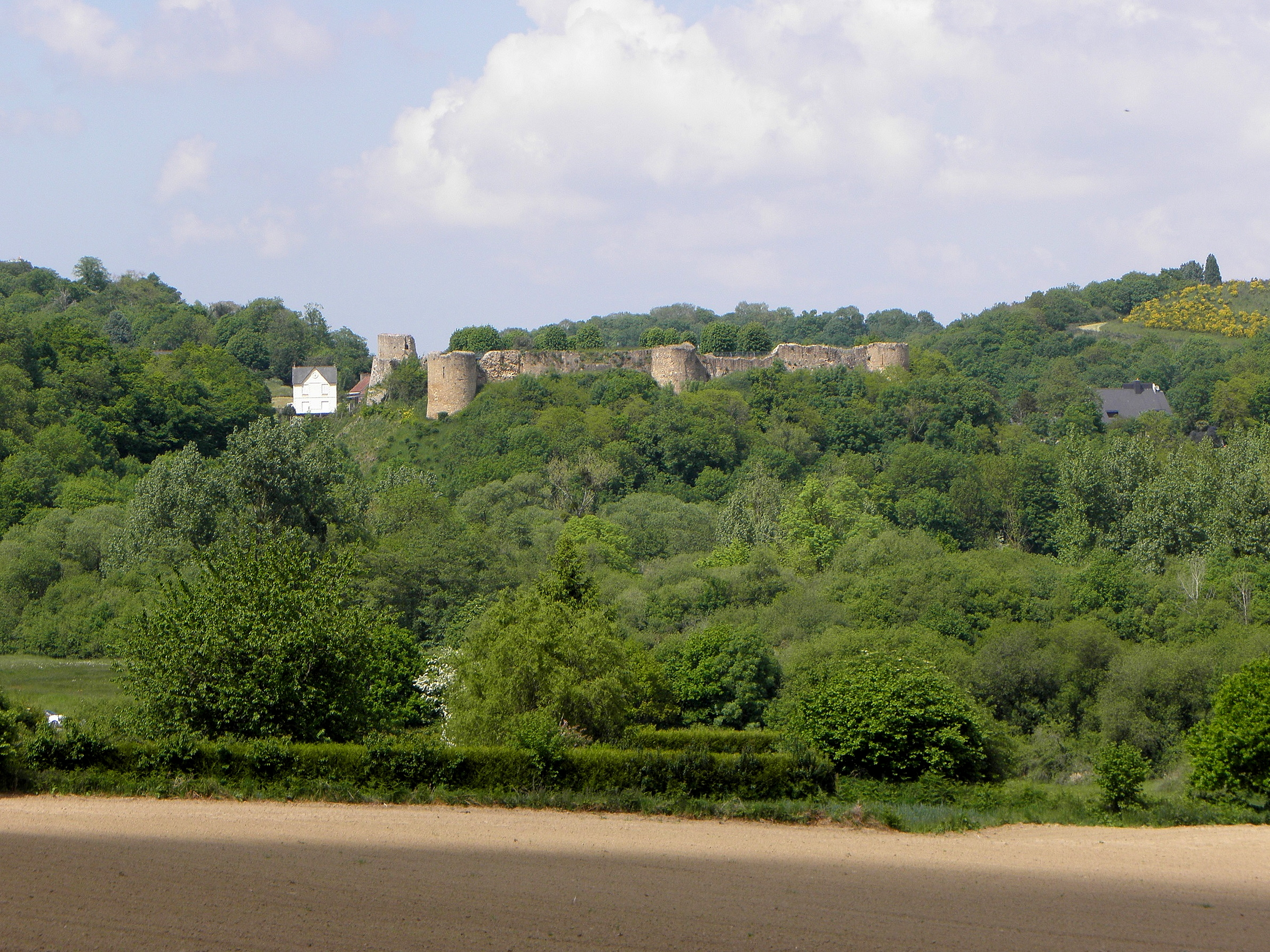 Château de Léhon (22). .